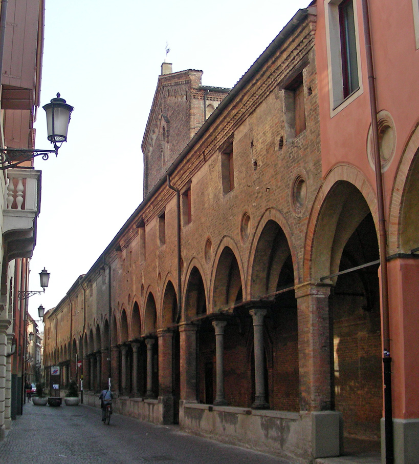 Padova, chiesa di San Francesco